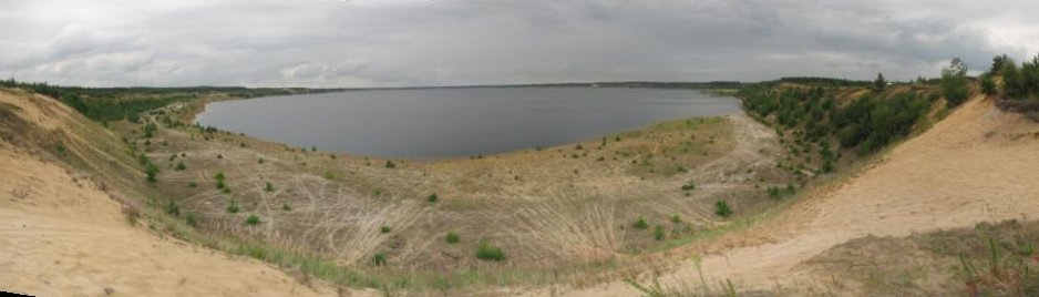 „Speicher Scheibe“, Tagebaurestloch nordöstlich von Hoyerswerda, in Flutung. Autostitch Panorama, daher die Bildlücke in der linken unteren Ecke.